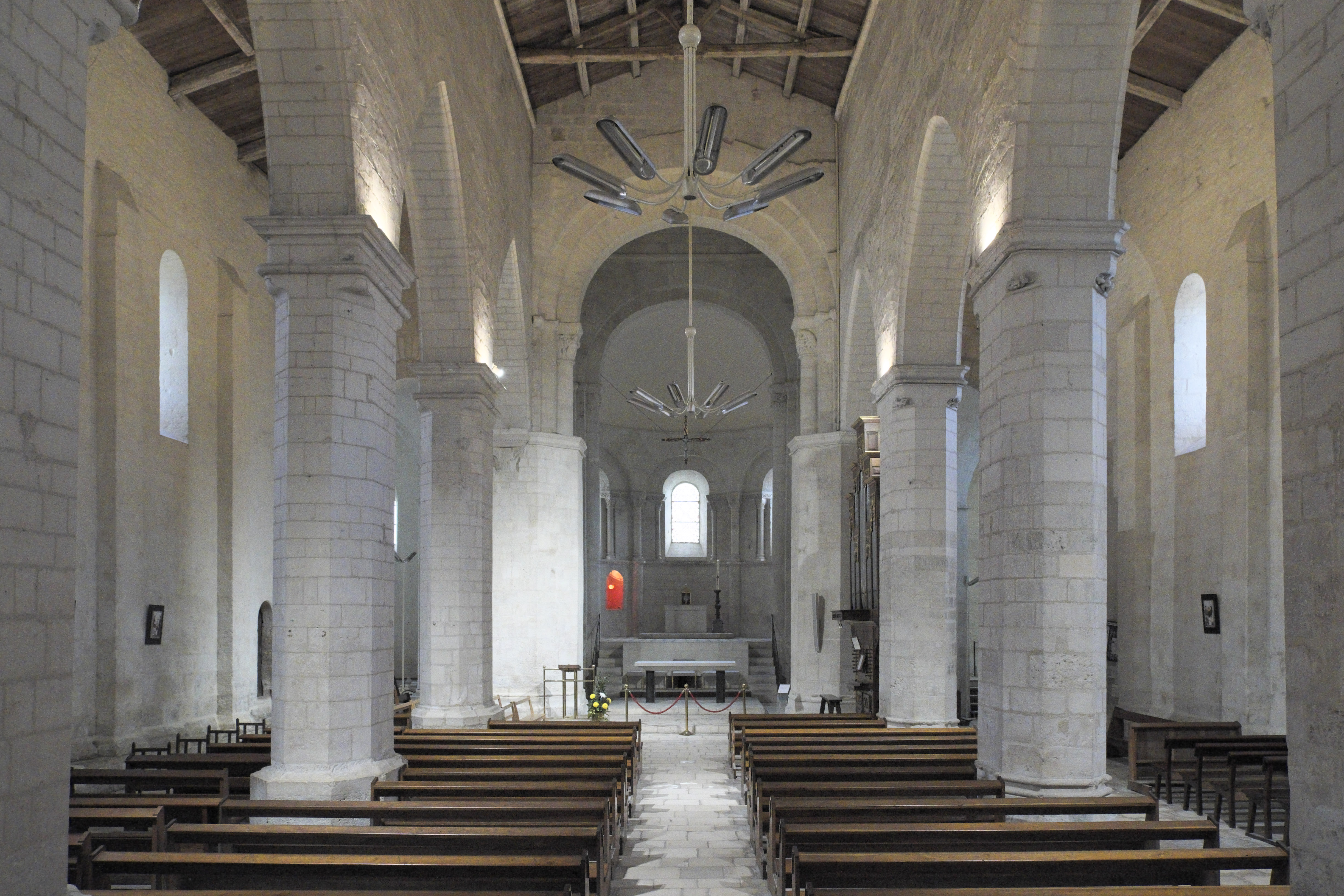 Katholische Kirche Notre-Dame-de-l’Assomption in Surgères im Département Charente-Maritime (Nouvelle-Aquitaine/Frankreich), Innenraum